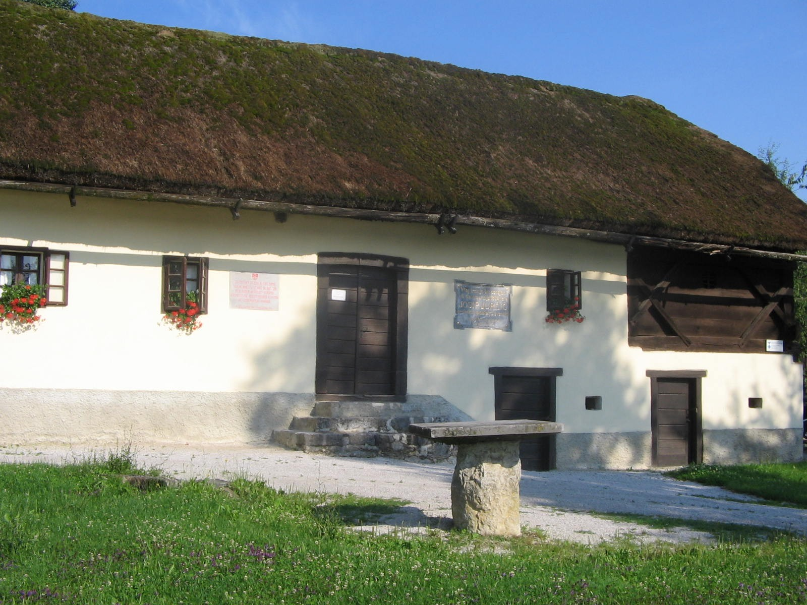 Geburtshaus von Josip Jurčič, slowenische Schriftsteler Quelle: eigene Aufnahme July 2005 Fotograf: Janez Novak, Ljubljana, Slovenija